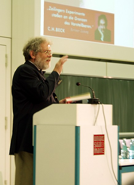 Bildbeschreibung: Prof. Anton Zeilinger bei seinem Vortrag "Die Welt als Information und Wirklichkeit" im Rahmen des Studium Generale der Universität Mainz am 11. Juli 2006. Zeilinger hatte dort die Stiftungsprofessur 2006 inne. Fotograf/Zeichner: Jochen Magnus Datum: 11.7.2006